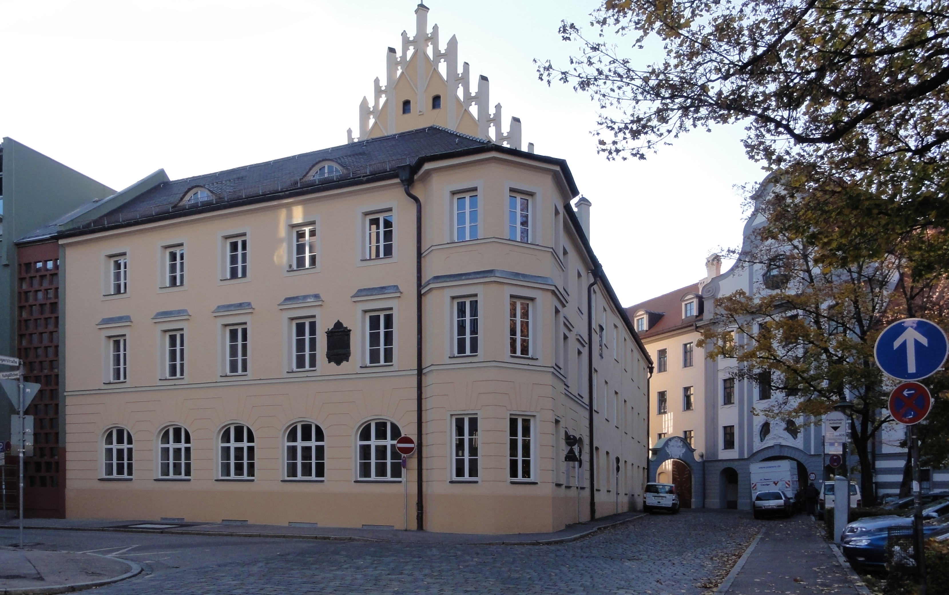 Augsburg, Fronhof 8 (Domviertel)